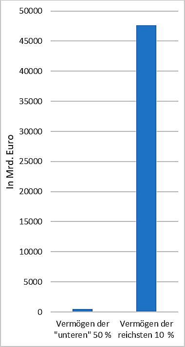 Absolutes Vermögen deutscher Haushalte nach Vermögensgruppe. Basiernd auf Angaben von Albers, Bartels, Schularick 2020. Seite 34: Total household wealth in 2018 was 17 trillion Euros. Seite 3: The aggregate wealth of all households in the bottom half of the wealth distribution only accounts for only 2.8% today. Seite 2: in 1993, the average wealth of households in the top 10% of the wealth distribution was 50 times higher than in the bottom half. In 2018, the gap has grown to 100 times.